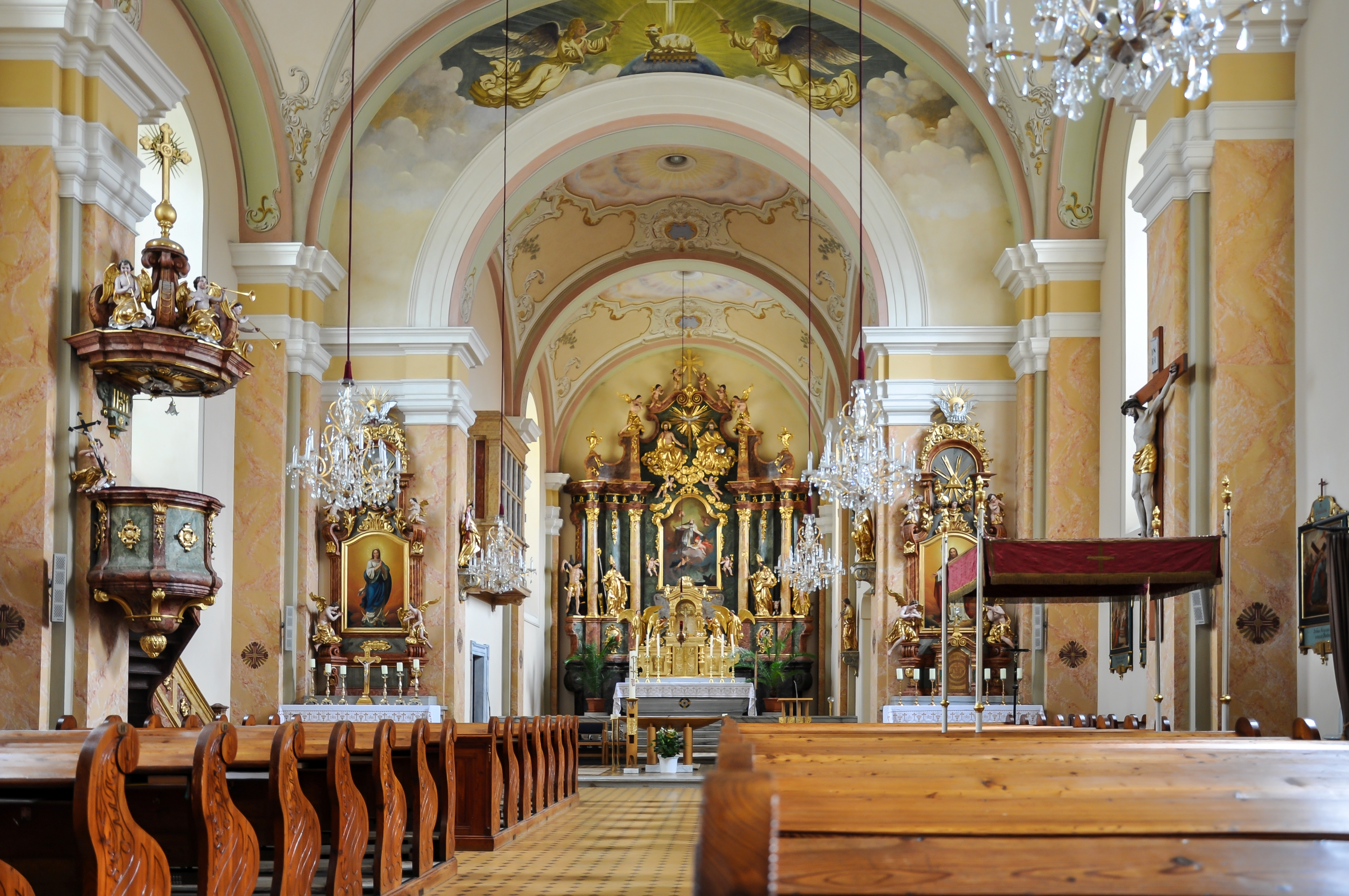 Kath. Pfarrkirche hl. Nikolaus